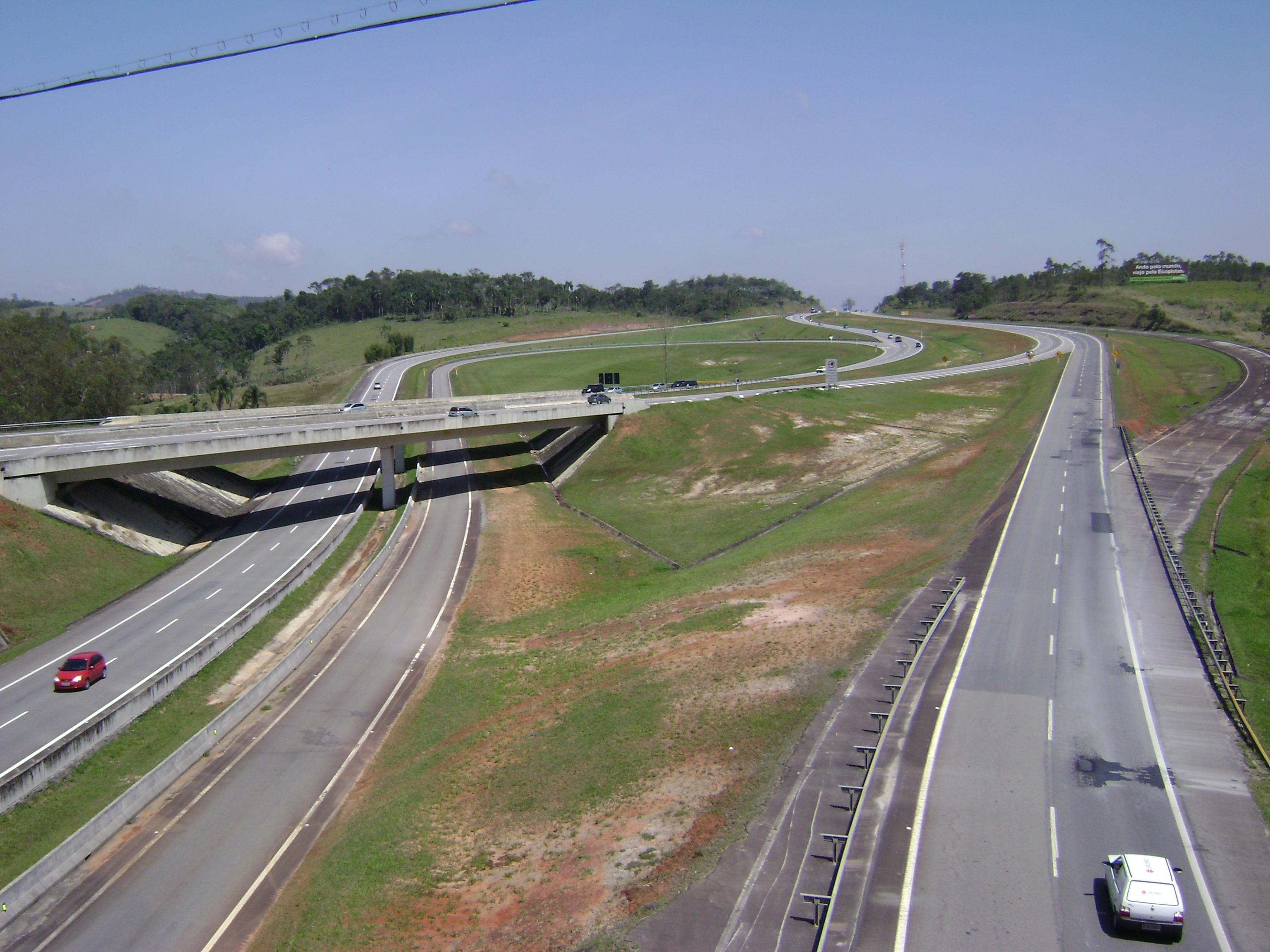 Interligação das Rodovias Ayrton Senna e Carvalho Pinto (ambas SP-70), em Guararema/SP.